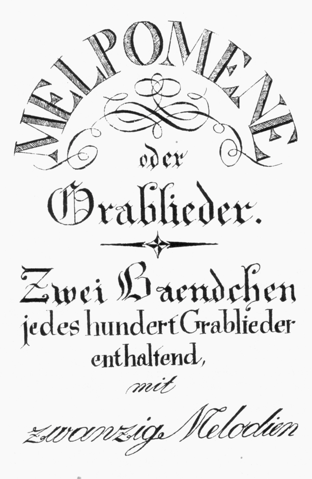 de: Michael von Jung: Melpomene oder Grablieder. Zwei Baendchen jedes hundert Grablieder enthaltend mit zwanzig Melodien.